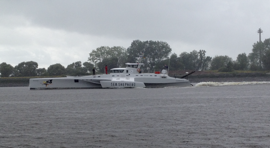 Die 'Brigitte Bardot' der 'Sea Shepherd Conservation Society' auf der Weser am 20.09.2015